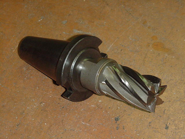 Milling